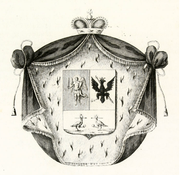 Герб рода князей Репниных